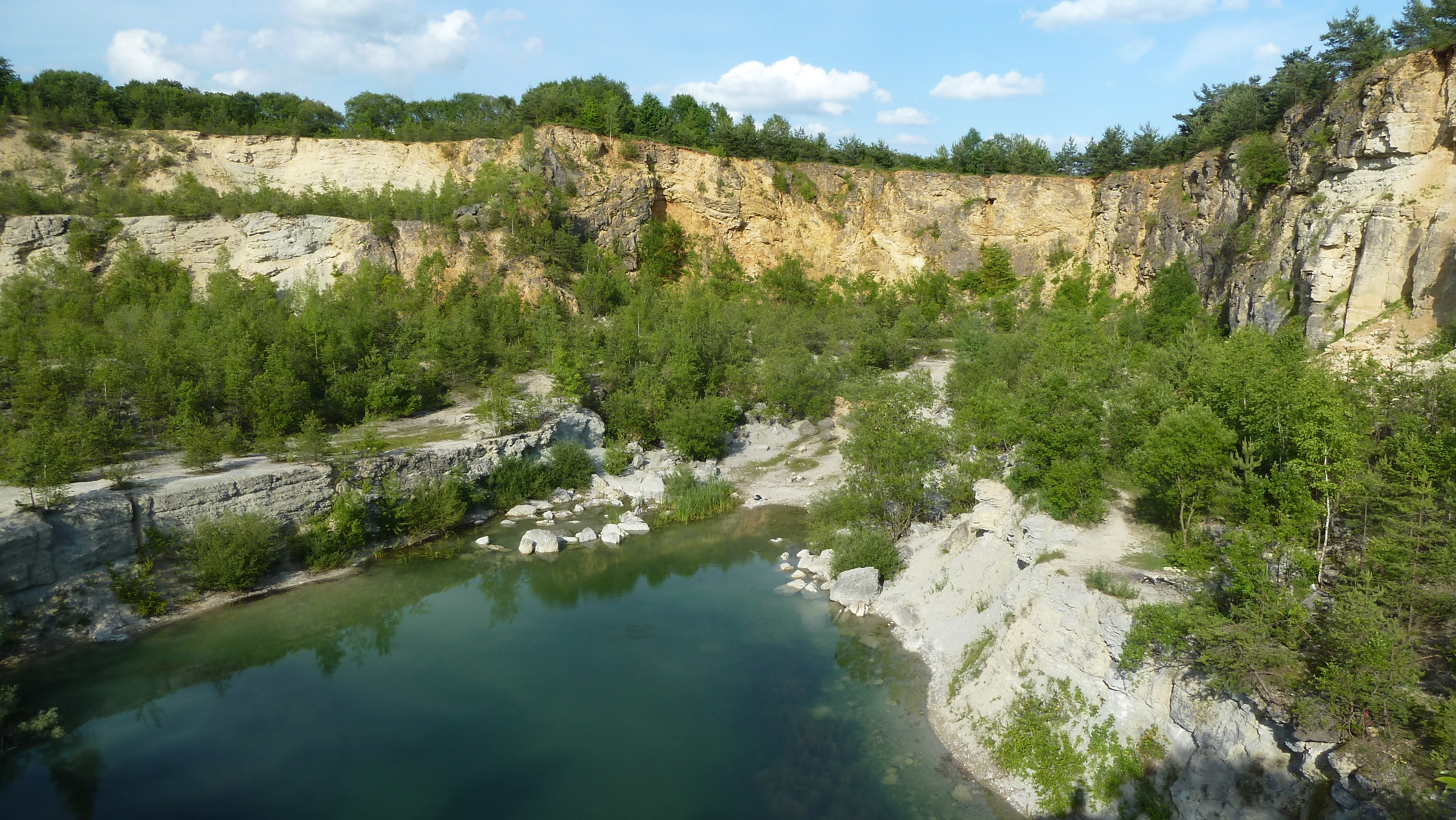 Ehemaliger Kalksteinbruch bei Ludwag, Gemeinde Scheßlitz, Lkr. Bamberg, Oberfranken